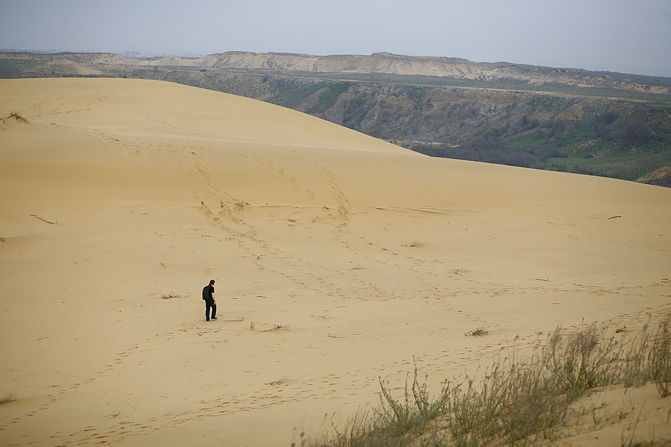 Бархан 'Сары-Кум': На территории государственного природного заповедника 'Дагестанский',Кумторкалинский район, Дагестан This image is related to the protected area of Russia number 0510023